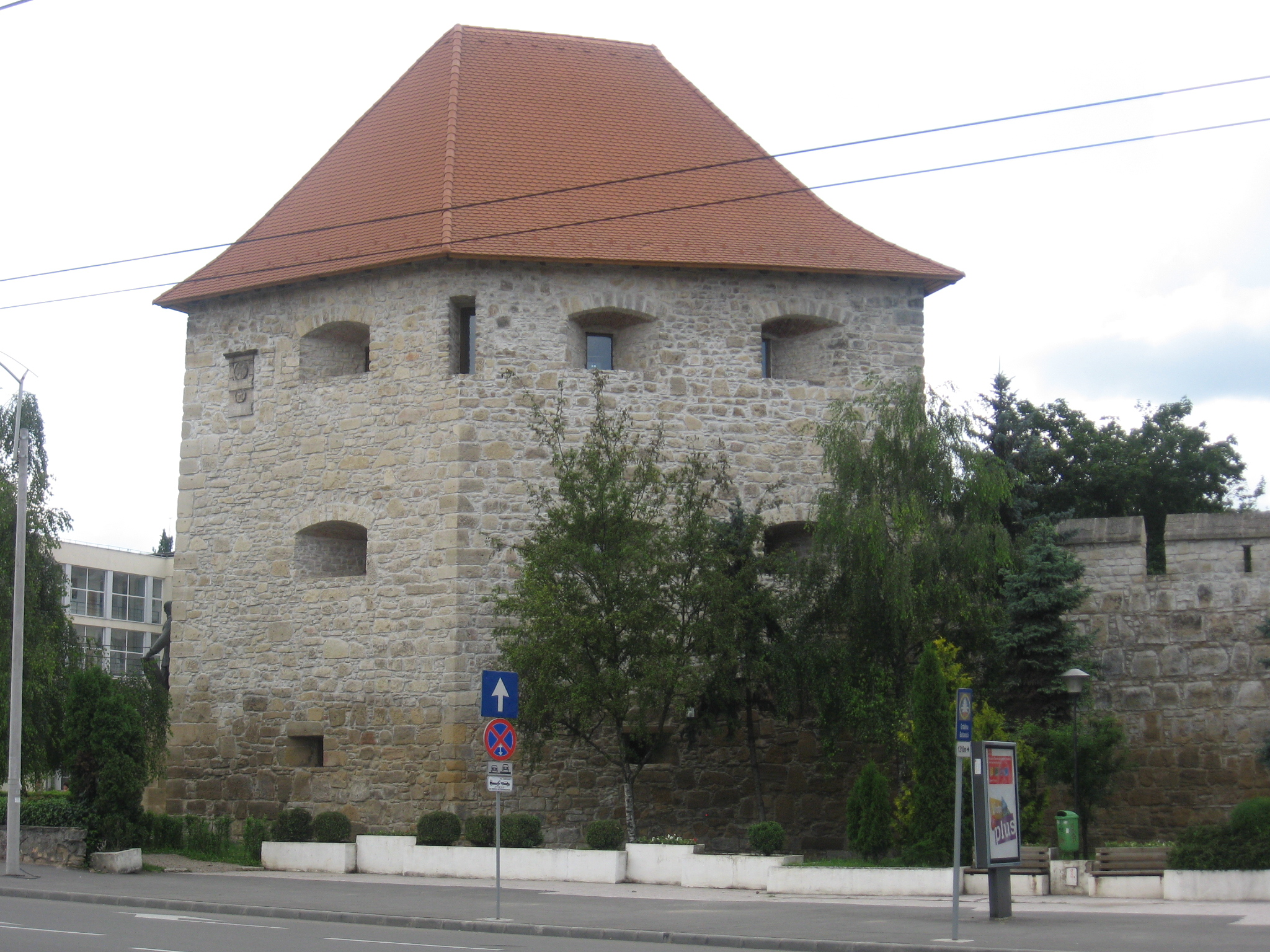 Szabók bástyája (KolozsvárRomână: Bastionul Croitorilor (Cluj-Napoca